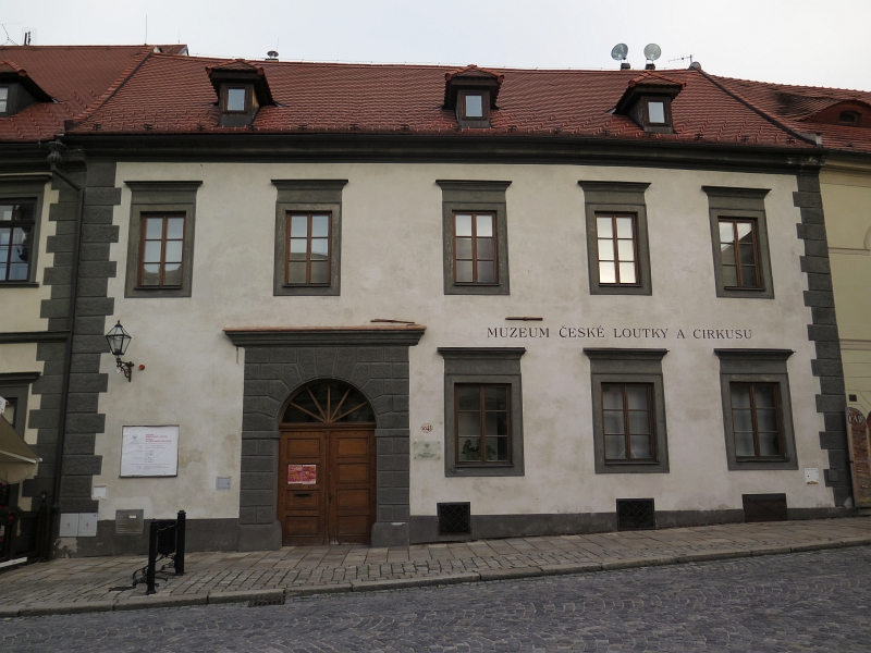 Muzeum české loutky a cirkusu (Prachatice),Dům čp. 43, Velké náměstí 43, Prachatice I, Prachatice.